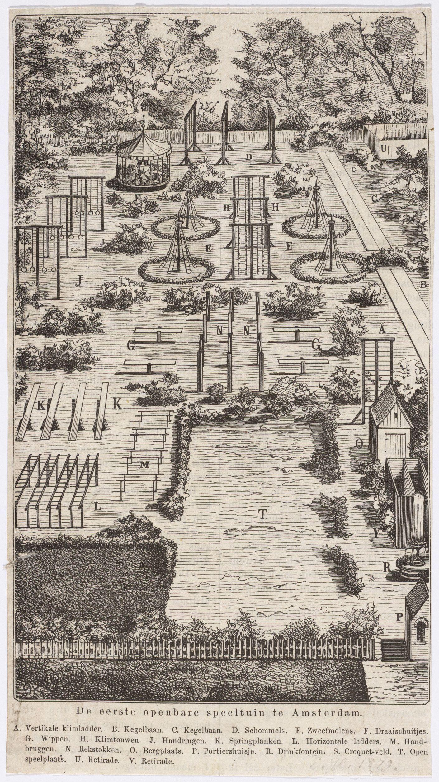 Beschrijving De eerste openbare speeltuin te Amsterdam De speeltuin op het Tweede Weteringplantsoen. De speeltoestellen waren ontworpen door Jacob Olie en uitgevoerd op zijn Ambachtsschool, recht tegenover de speeltuin. Documenttype prent Vervaardiger Walter, Joh. Collectie Collectie Stadsarchief Amsterdam: los beeldmateriaal Datering oktober 1879 Geografische naam Tweede Weteringplantsoen Inventarissen Afbeeldingsbestand 010194001586